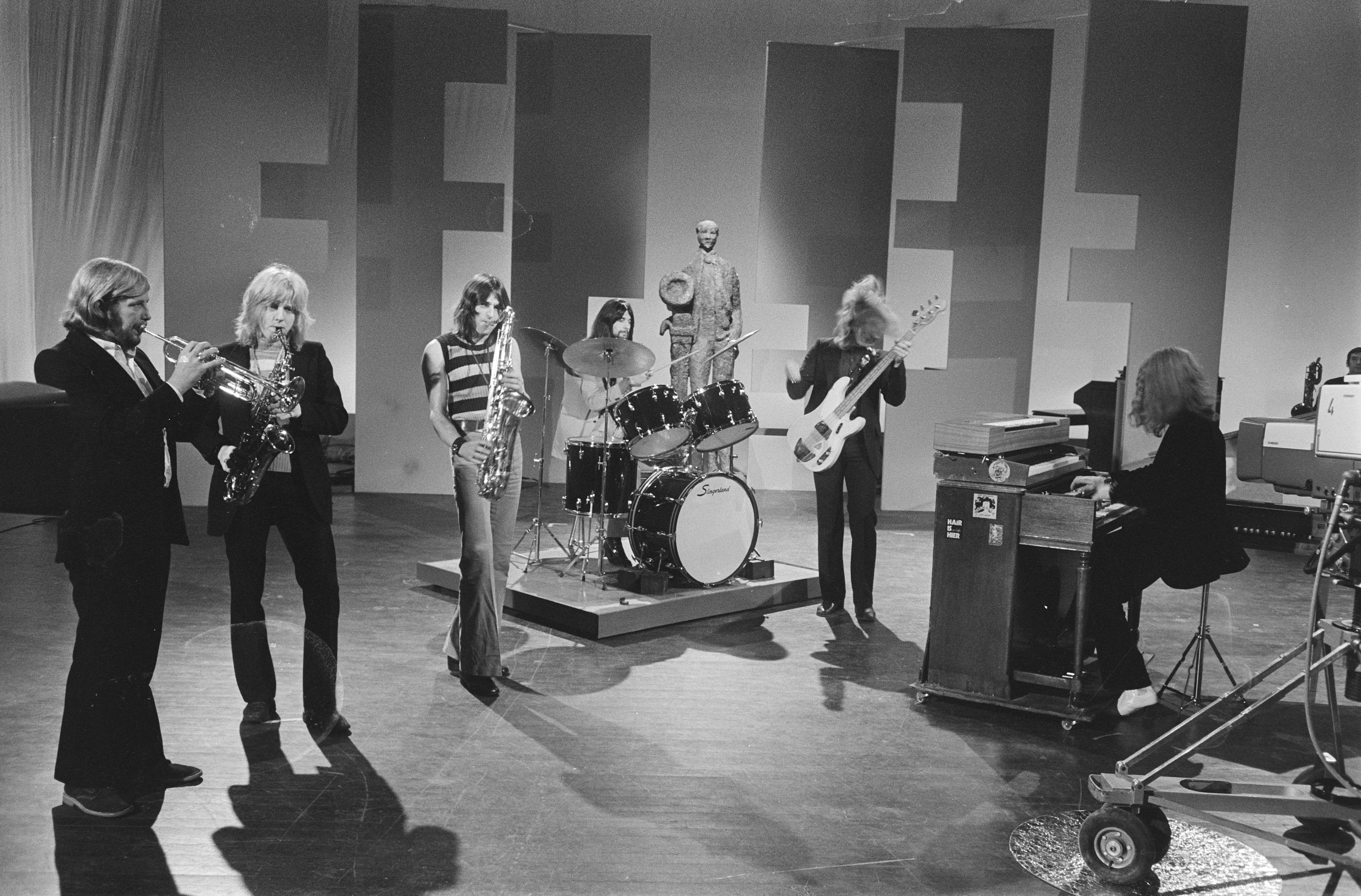 Collectie / Archief : Fotocollectie Anefo Reportage / Serie : [ onbekend ] Beschrijving : Willem Duys reikt Edisons uit in TV-programma "Voor de vuist weg". De symphonische rockband Ekseption Datum : 26 februari 1971 Trefwoorden : popmuziek, prijsuitreikingen Fotograaf : Verhoeff, Bert / Anefo Auteursrechthebbende : Nationaal Archief Materiaalsoort : Negatief (zwart/wit) Nummer archiefinventaris : bekijk toegang 2.24.01.05 Bestanddeelnummer : 924-3069 Reacties Geplaatst door Maaike op 14 april 2012 - 13:38. Ekseption, symfonische rockband. In de beginjaren ook wel 'de klassieke undergroundgroep' genoemd.